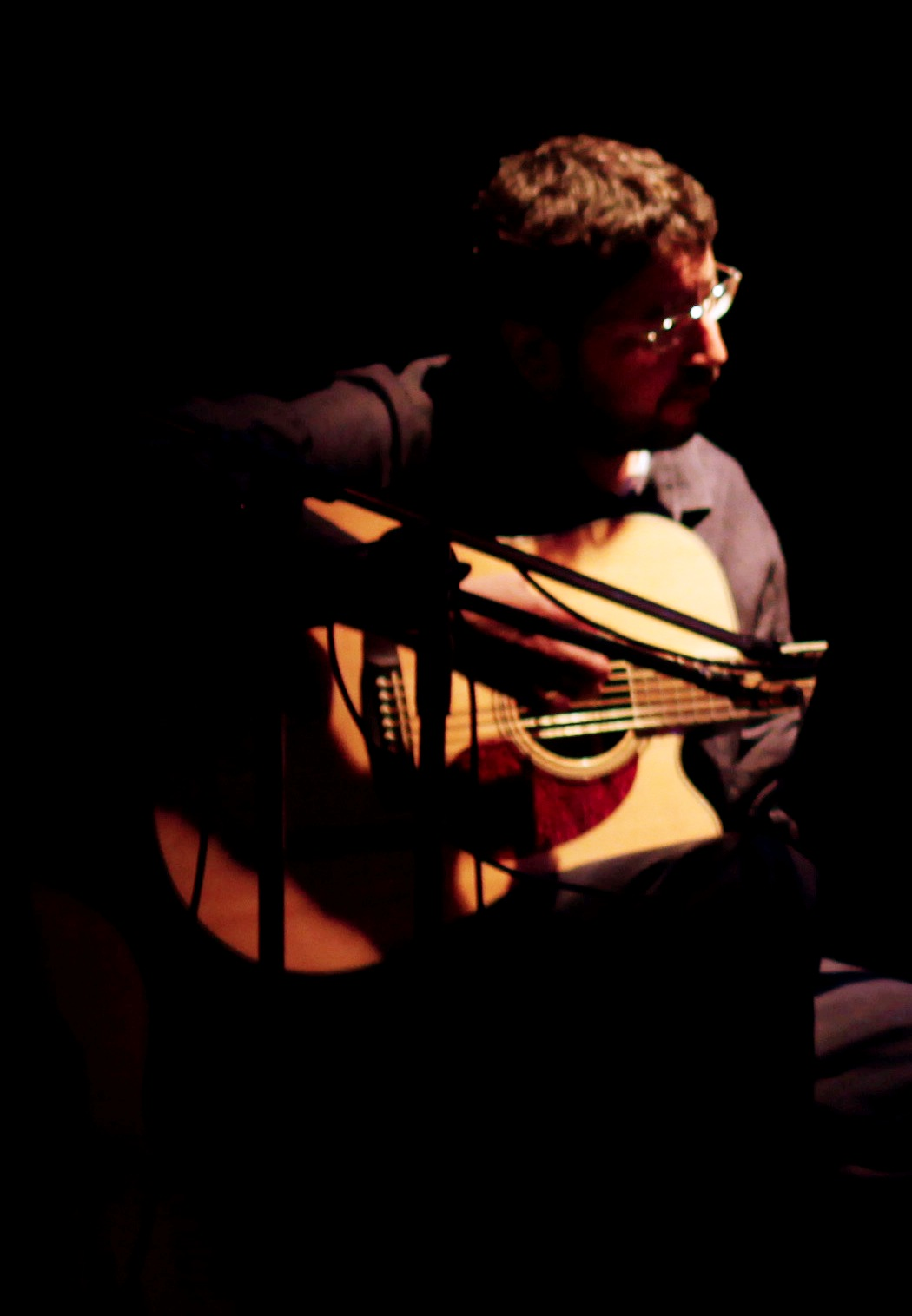 İncesaz konserinde Cengiz Onural